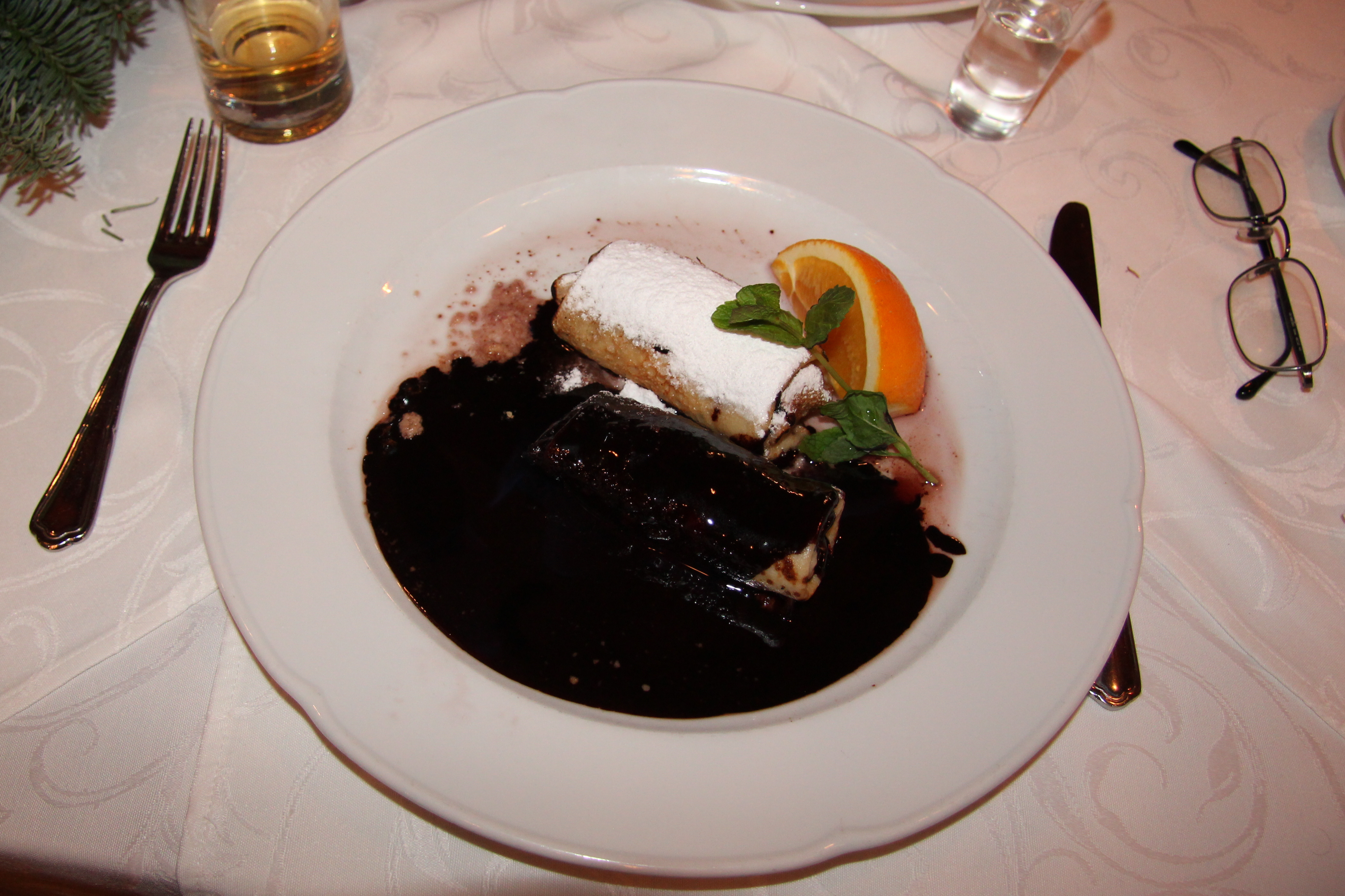 Gundel-Palatschinke im Matthiaskeller in Budapest